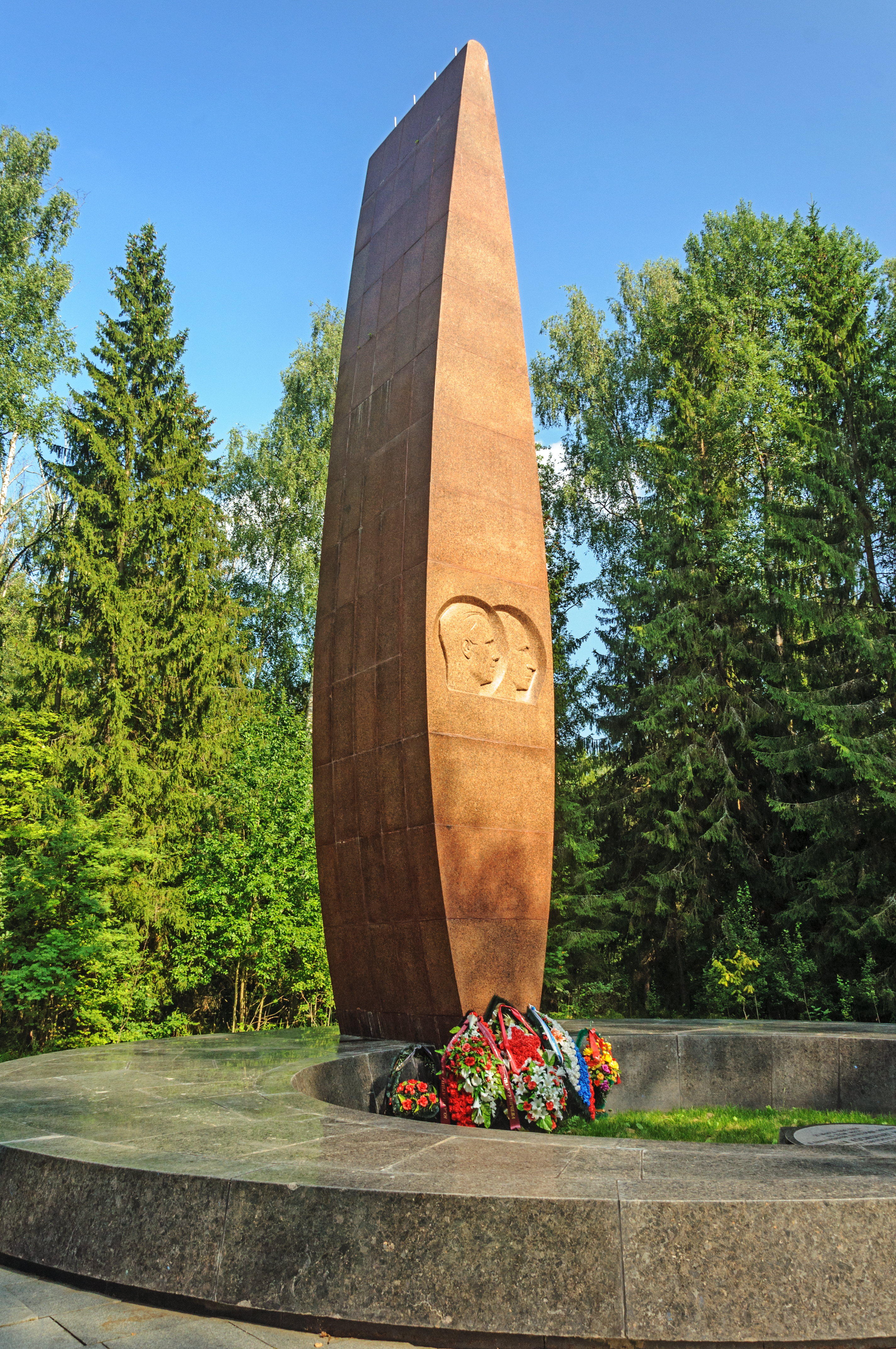 Место гибели в 1968 г. Гагарина Ю.А. и Серегина В.С.: 3 км от села, Новоселово, Киржачский район, Владимирская область